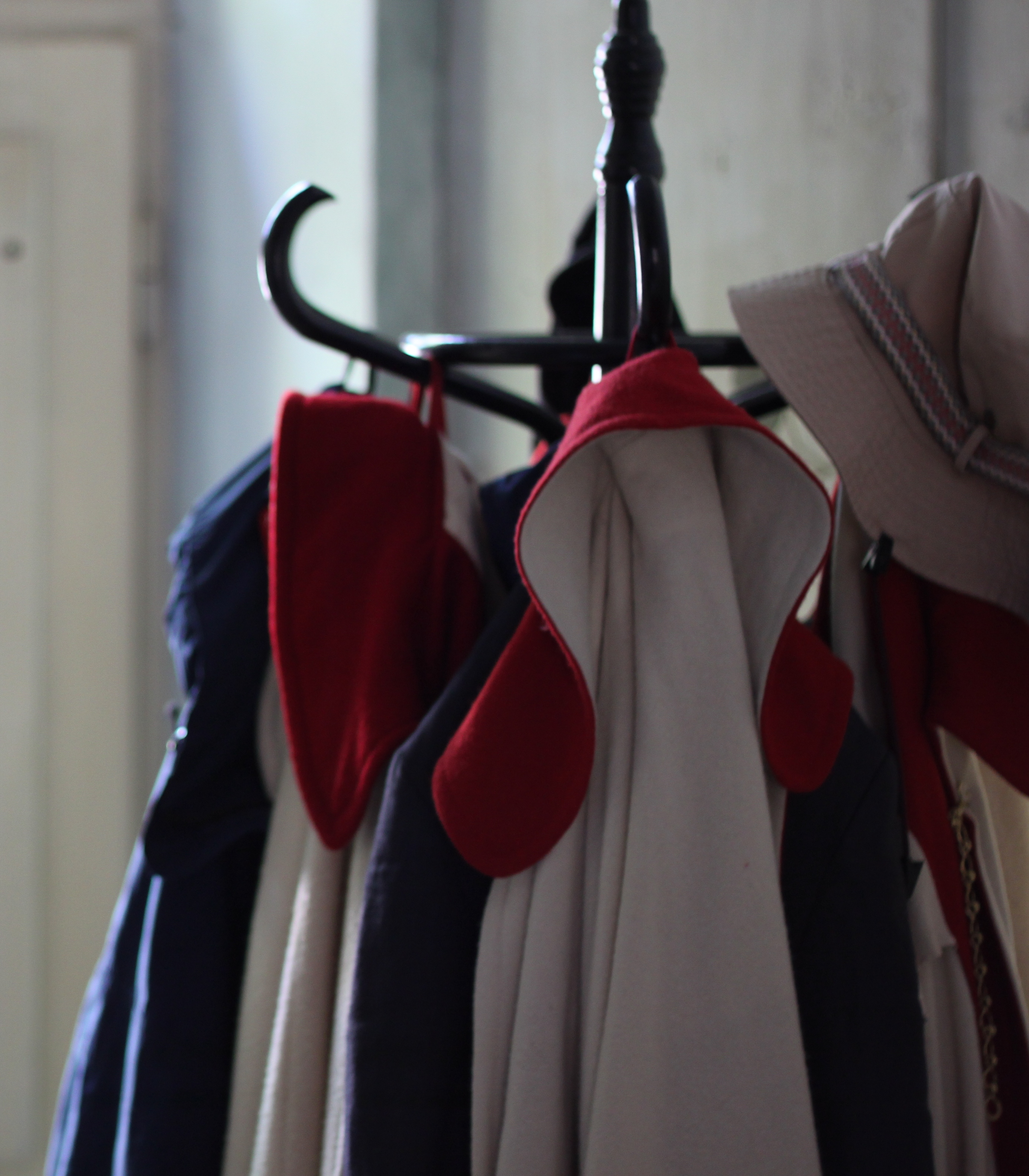 Mäntel der Oberbozner Schützengesellschaft